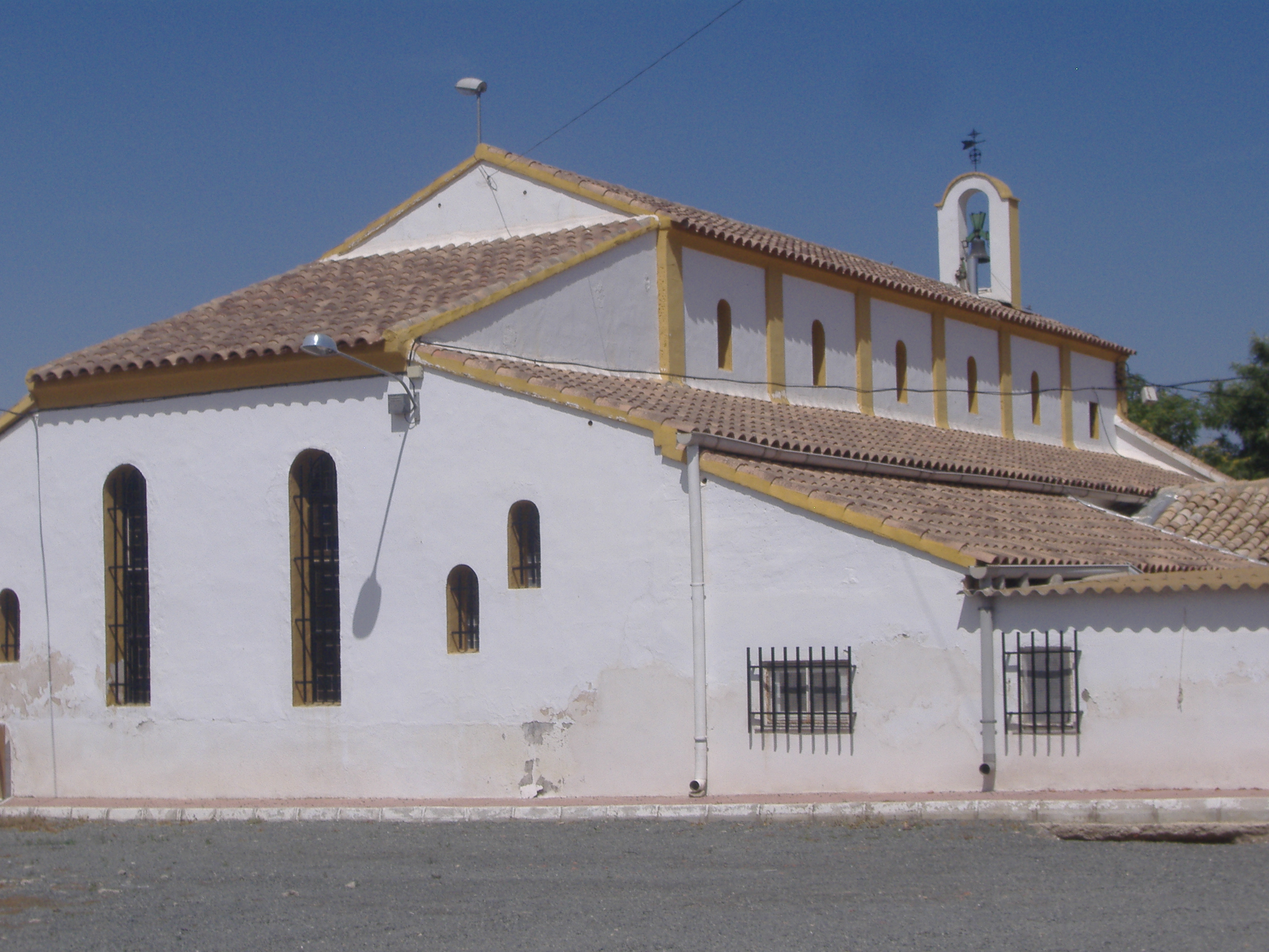 Vista de la parte trasera de la Ermita de la Purísima Concepción situada en la pedanía de El Esparragal